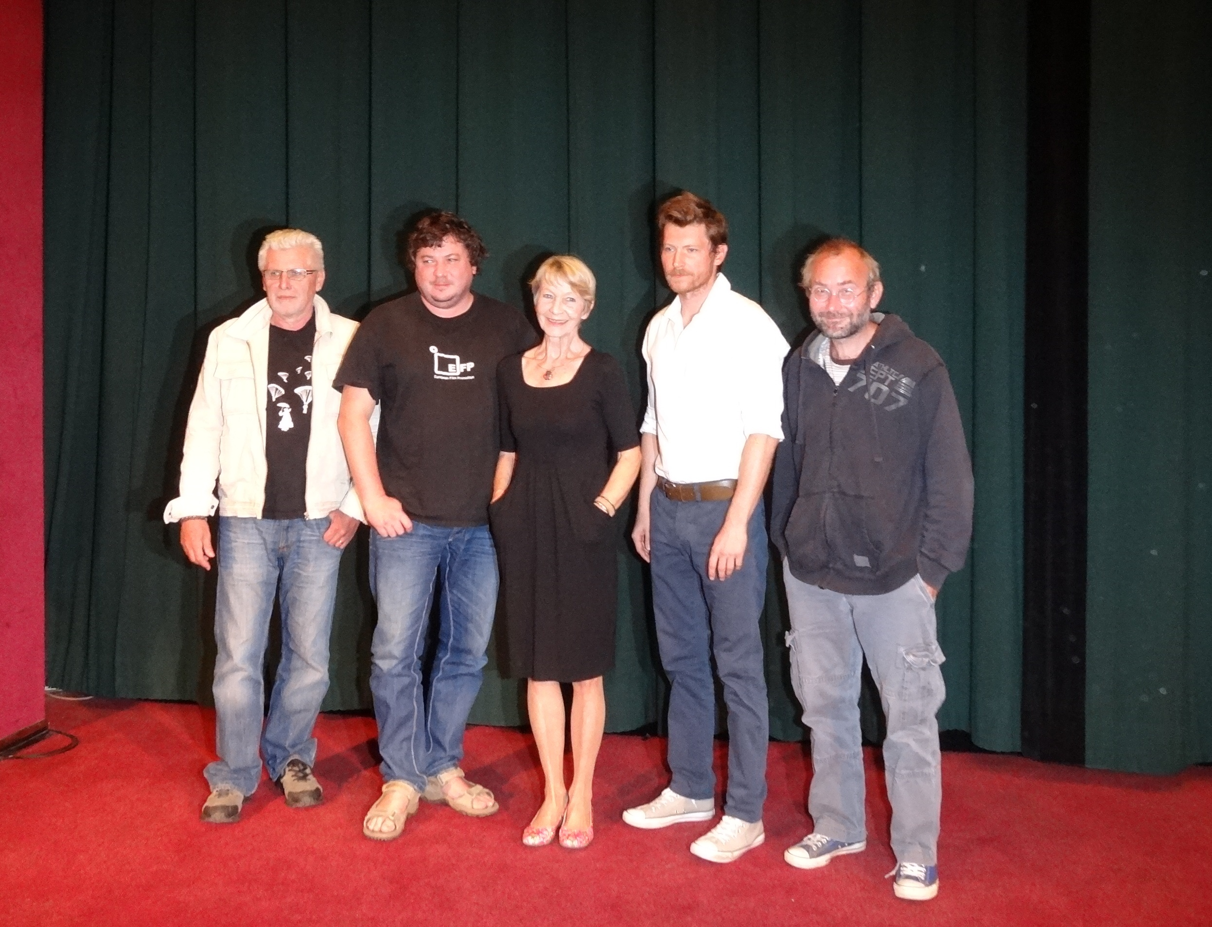 Fotky z novinářské konference z 28. srpna - Autor Lucie Borová pro & 10Mpix.cz